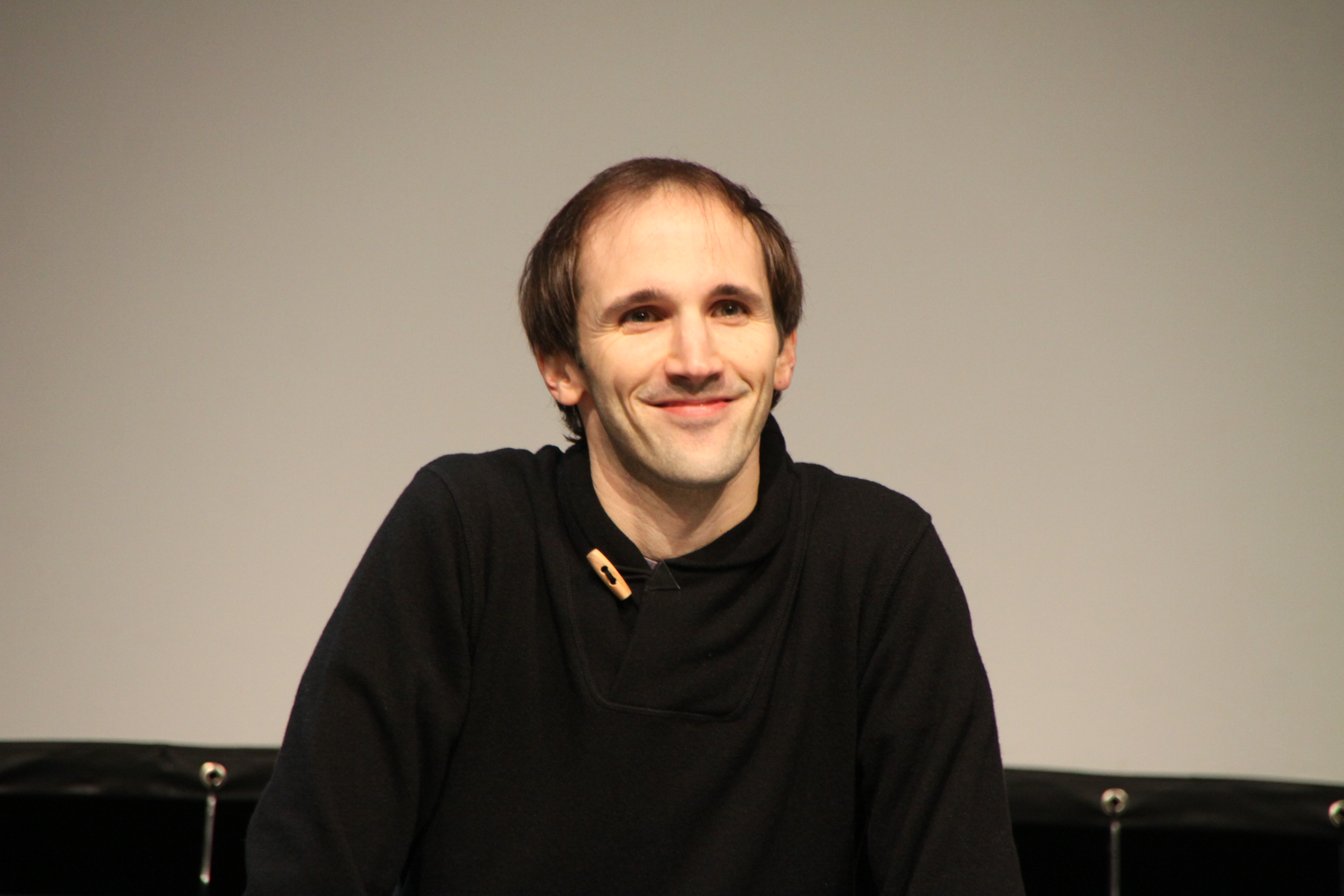 2013ko abenduaren 15ean jokatu zen Barakaldoko BECen Bertsolari Txapelketa Nagusia. Maialen Lujanbio, Aitor Mendiluze, Amets Arzallus, Sustrai Colina, Aitor Sarriegi, Beñat Gaztelumendi, Igor Elortza eta Unai Iturriaga igo ziren oholtzara, 13.500 bertsozaleren aurrean. Bertsolari Txapelketa Nagusia 2017. Egilea: Uribe Kosta eta Erandioko agerkaria.